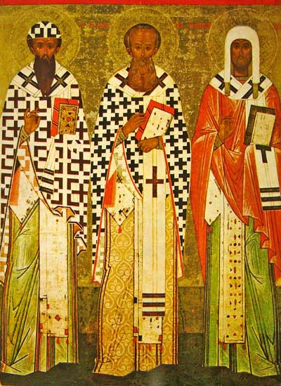 Кирилл и Афанасий Александрийские, Леонтий Ростовский. Школа или худ. центр: Новгород. Конец XV в. 147×107 см. Новгородский гос. историко-архитектурный и худо­жест­вен­ный музей-заповедник, Новгород, Россия. Инв. 10922. Икона являлась храмовым образом церкви Кирилла и Афанасия Мало-Кириллова монастыря.